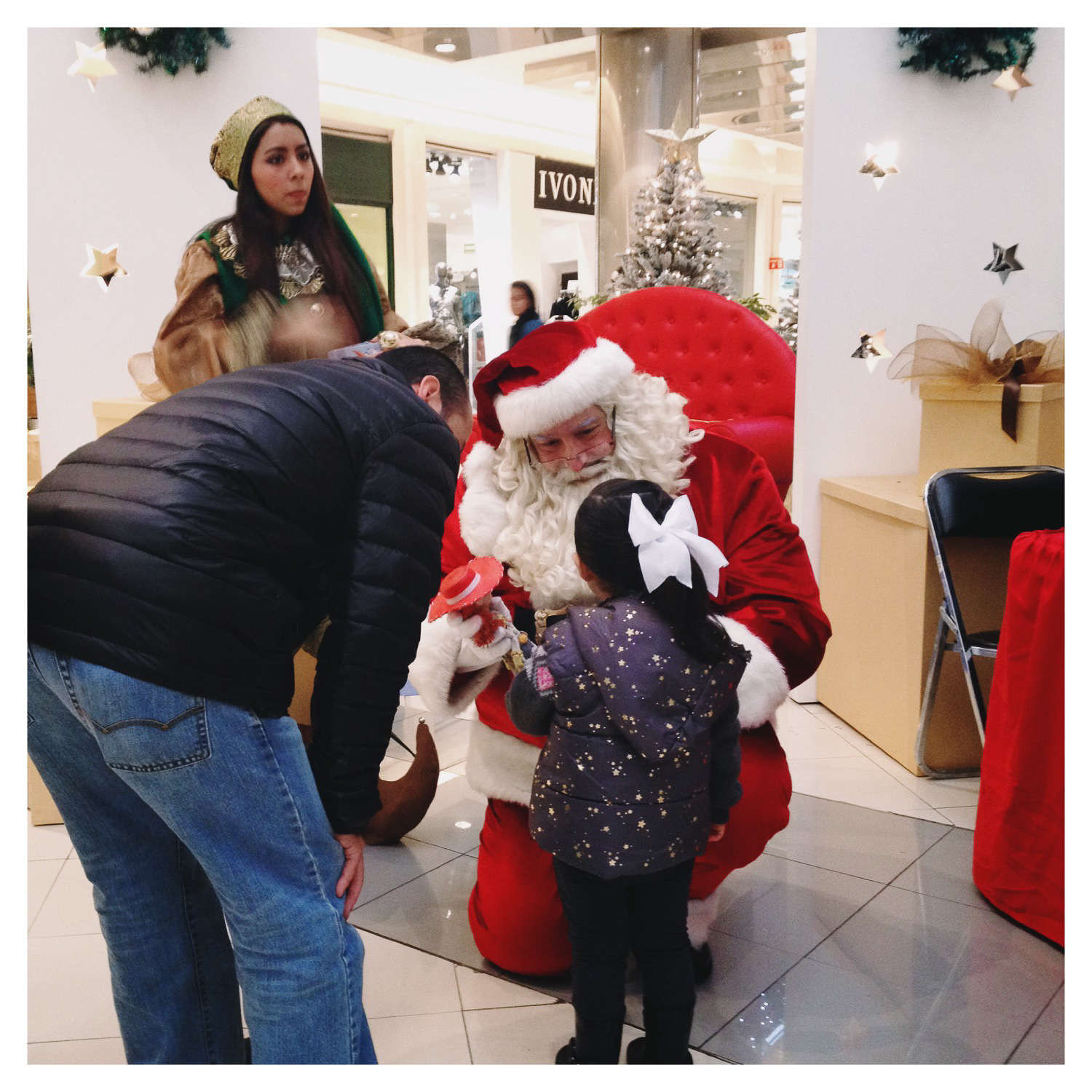 Santa Clause in Coyoacán